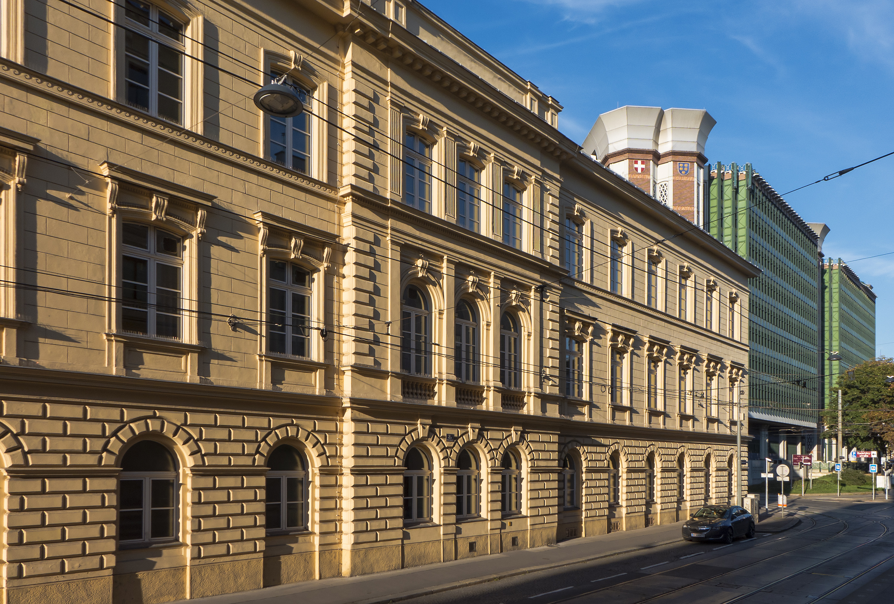 Gymnasium Radetzkystraße in Wien 3